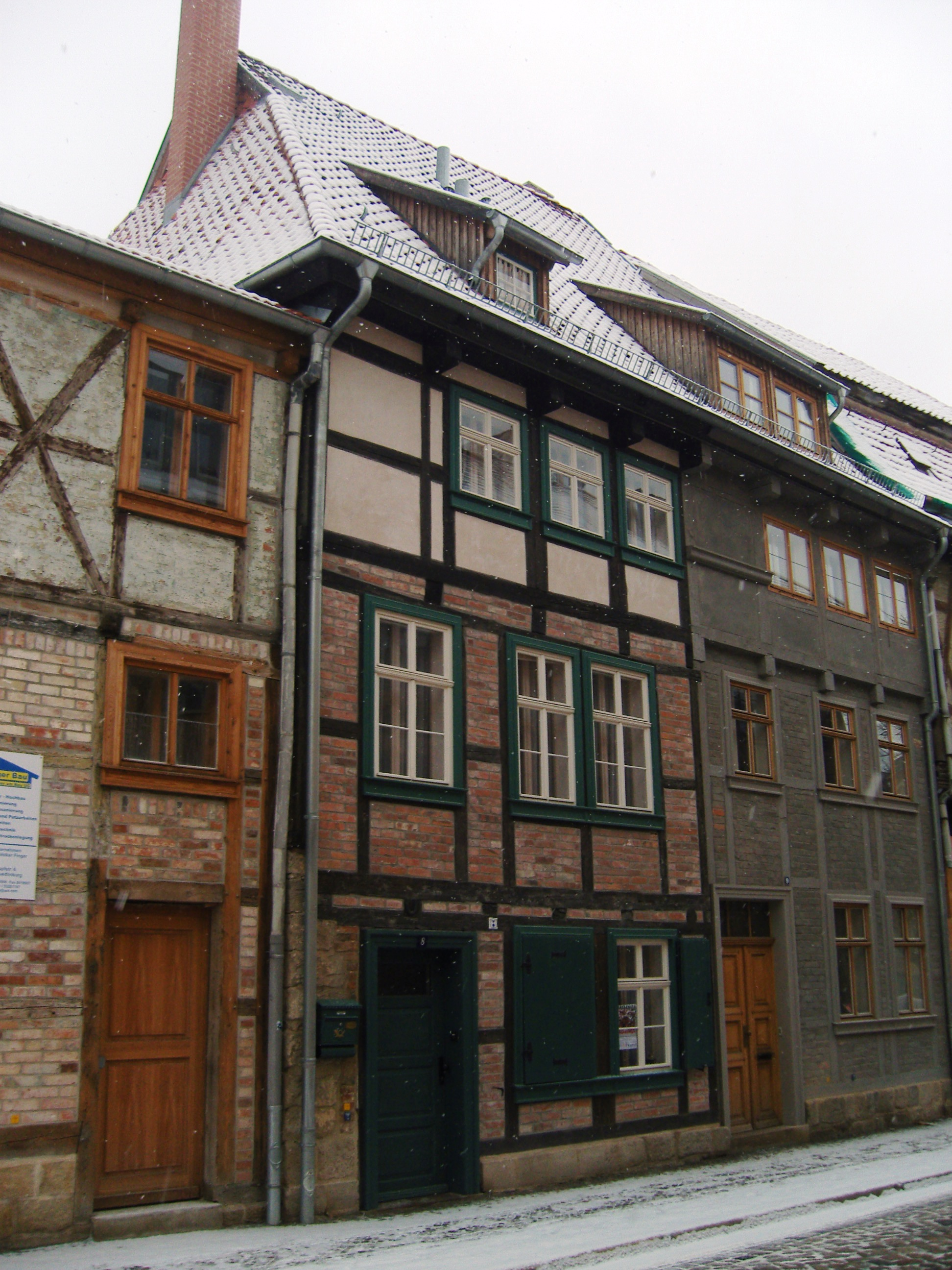 Denkmalgeschütztes Wohnhaus in der Straße Klink 8 in Quedlinburg